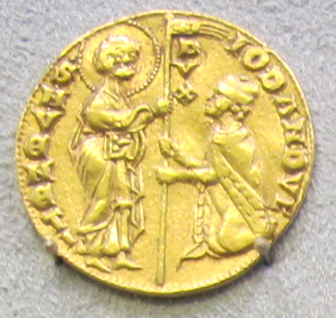 Venezia, ducato d'oro (zecchino), 1280-89